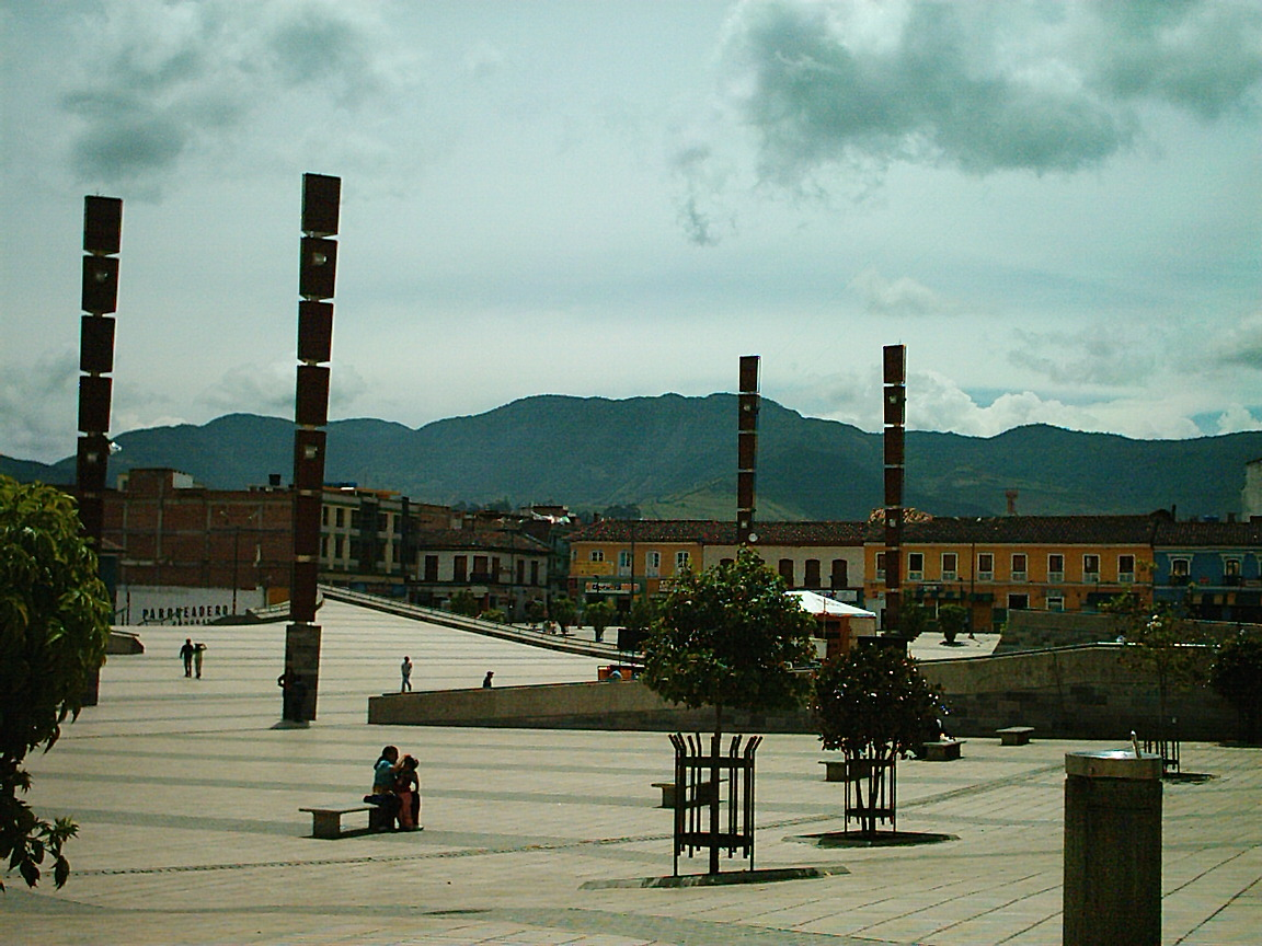 La plaza del carnaval se edificó en donde antes funcionaba el terminal de transportes de la ciudad de Pasto, esta plaza se inauguró en el año 2004